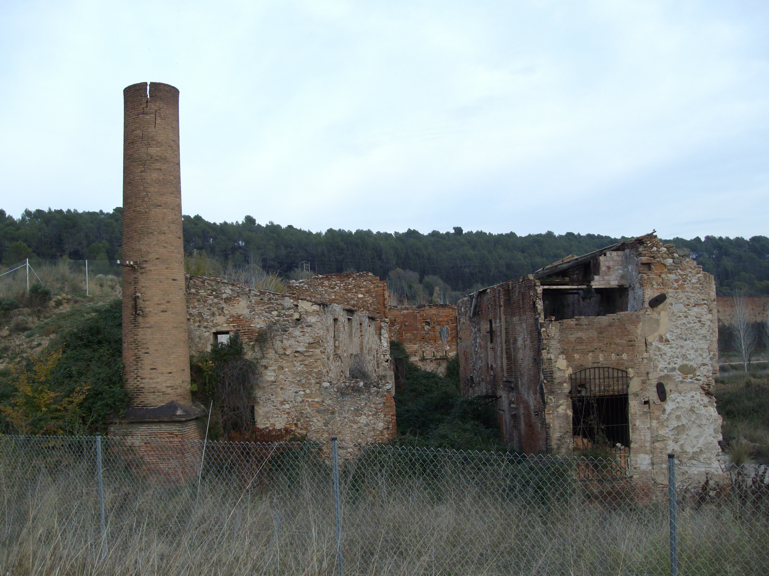 Molino d'en Font.